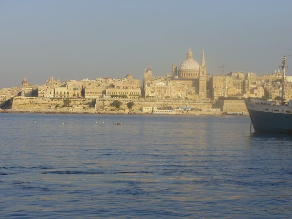 Vistas de La Valeta, en Malta